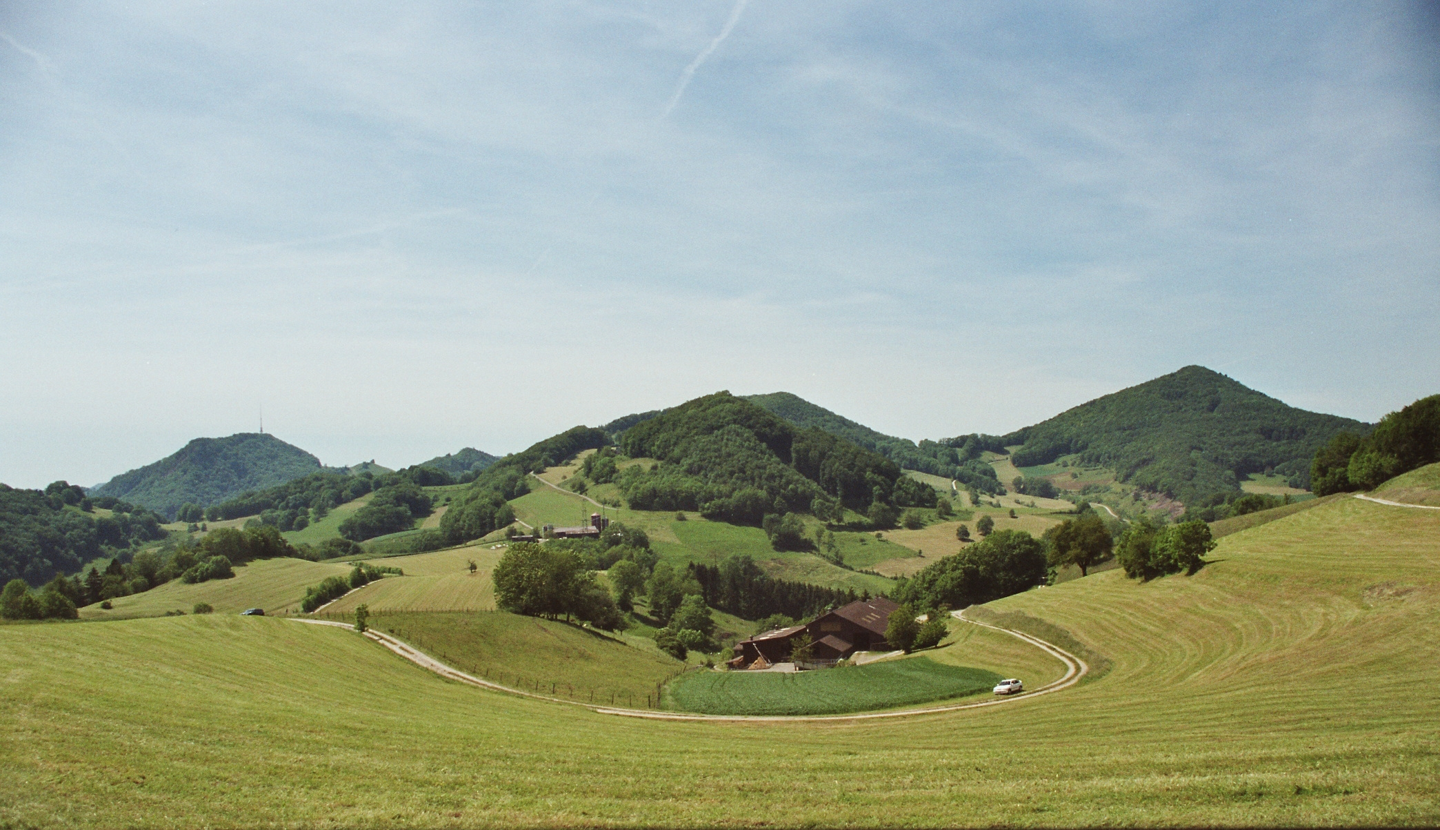 Staffelegg